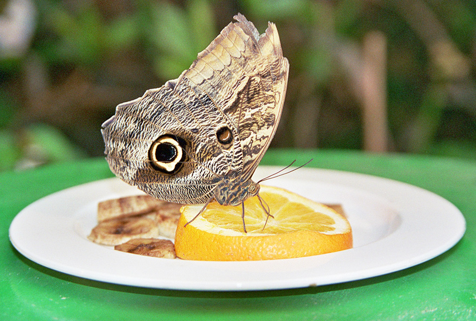 Caligo eurilochus (de: Bananen- od. Eulenfalter) at the Schmetterlingshaus (butterfly house) in the Burggarten in Vienna